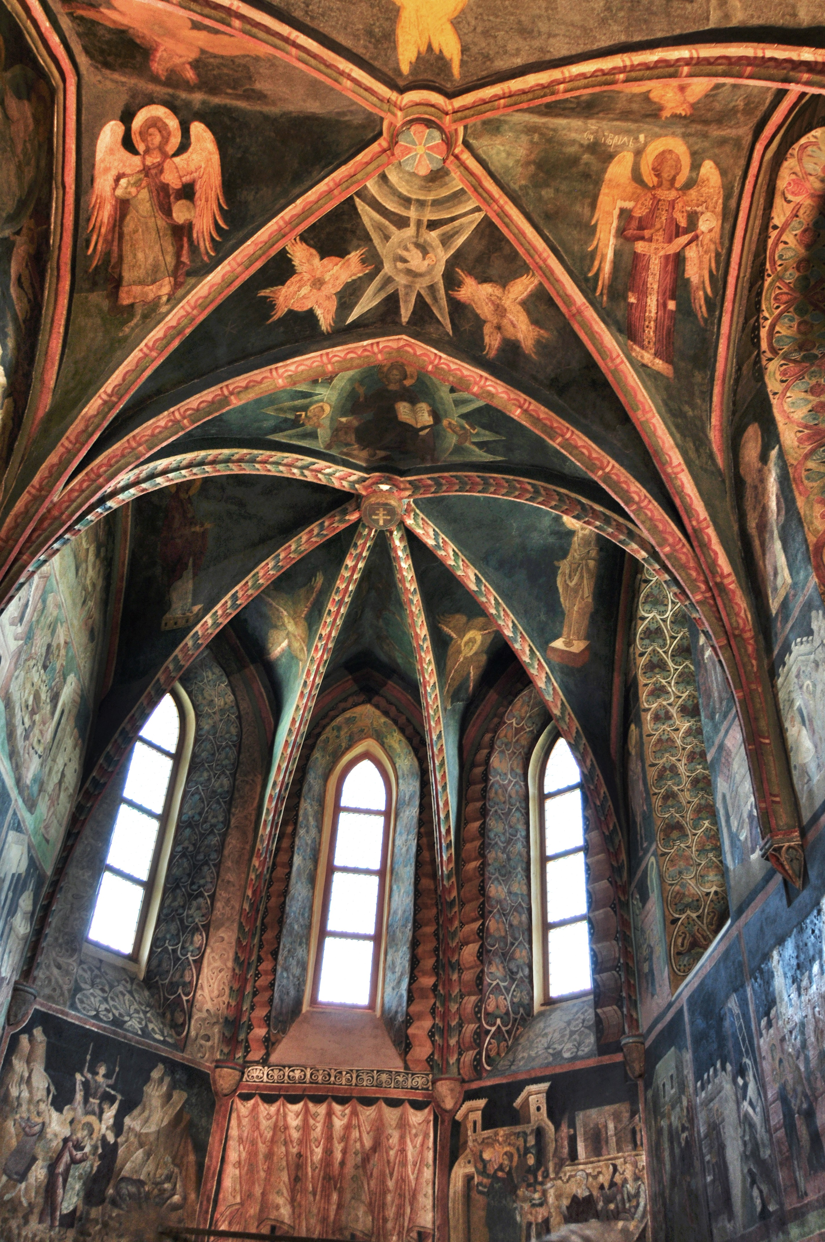 Lublin, kaplica p.w. Św. Trójcy, poł. XIV, XV, XVII